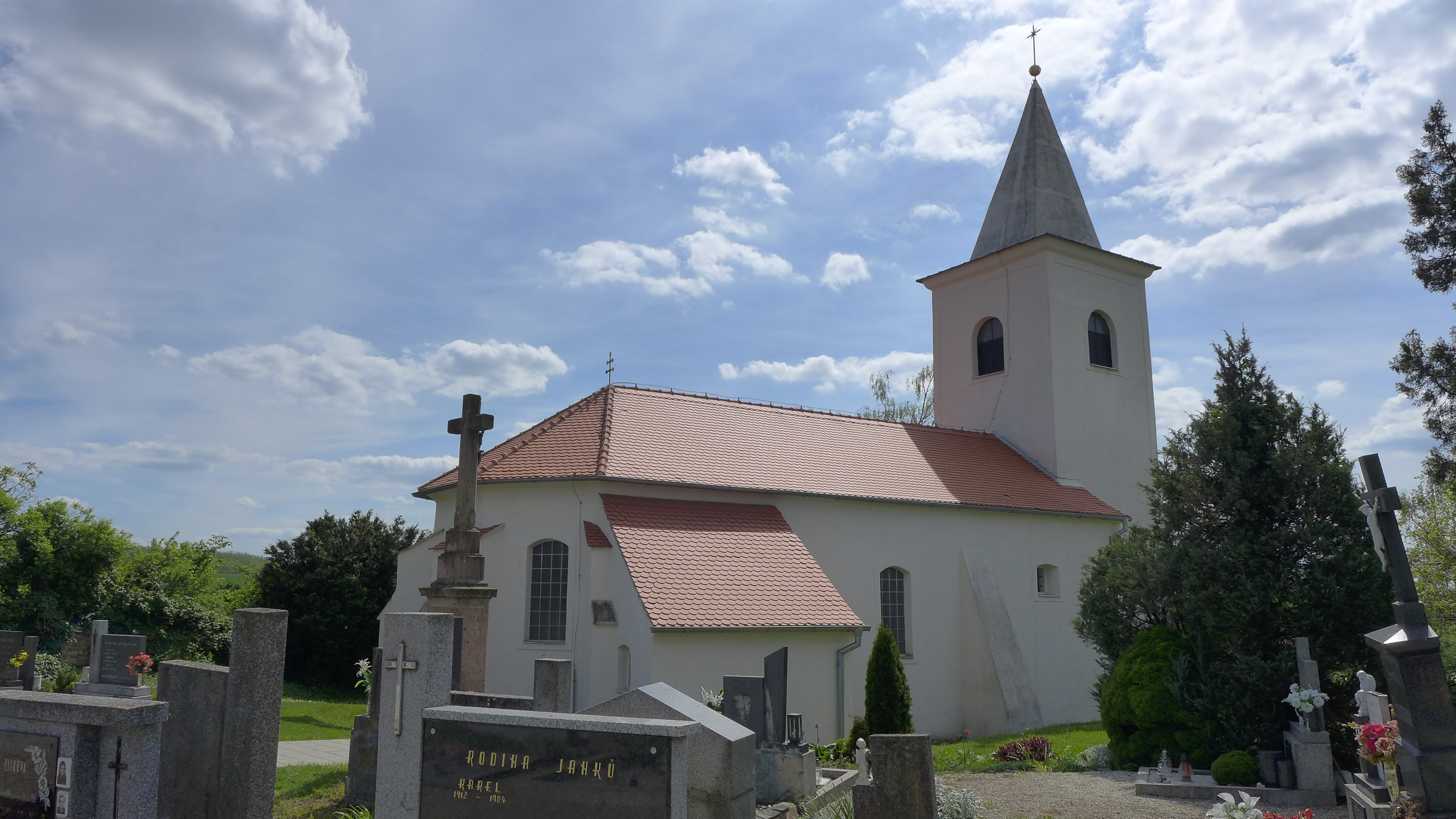 Kostel svatých Filipa a Jakuba, v obci, Kadov (okres Znojmo).